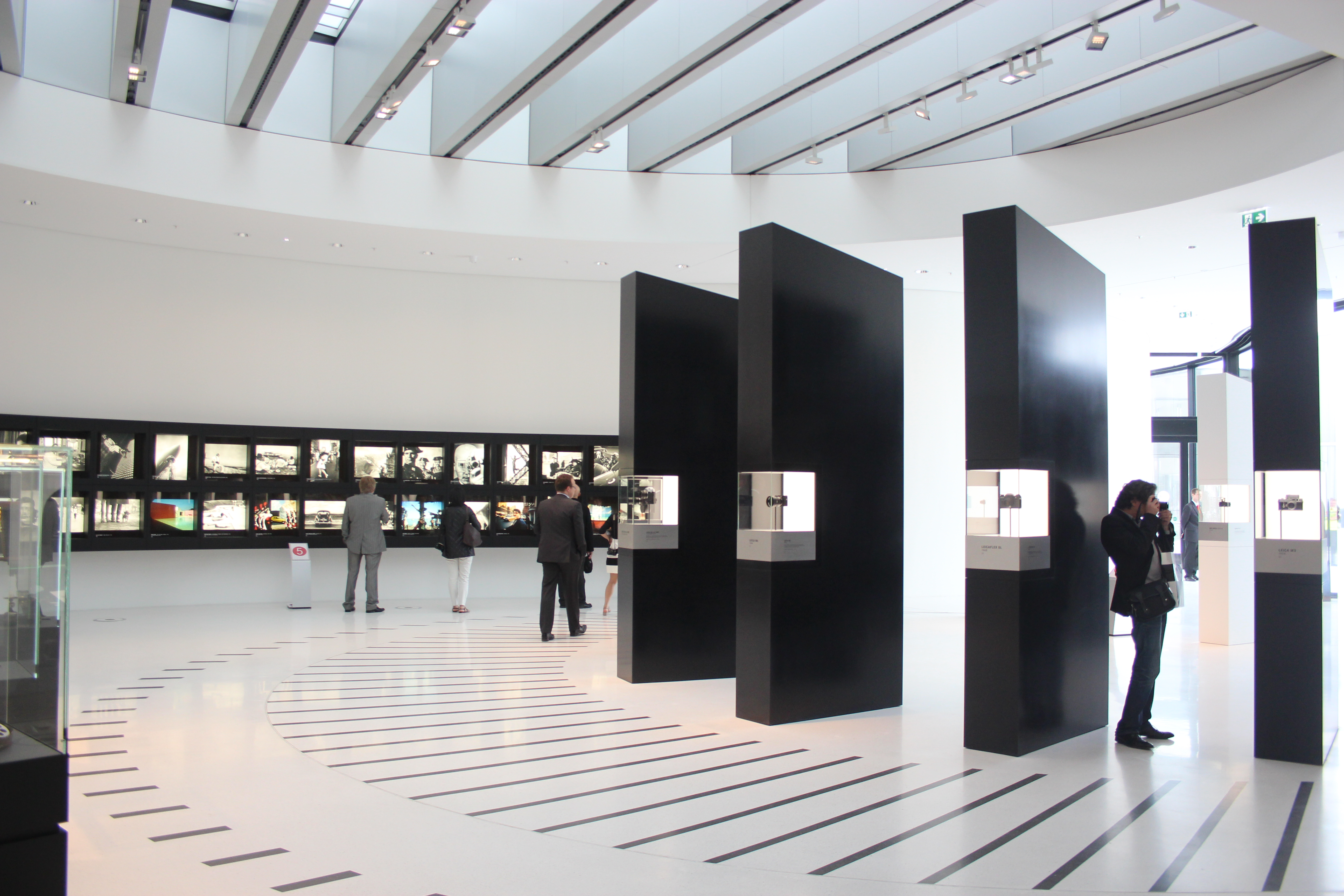 Leica-Welt: Neubau der Leica Camera AG in Wetzlar - Foyer mit Ausstellung. Architekten: Gruber + Kleine-Kraneburg Architekten